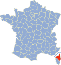 Haute-Corse.